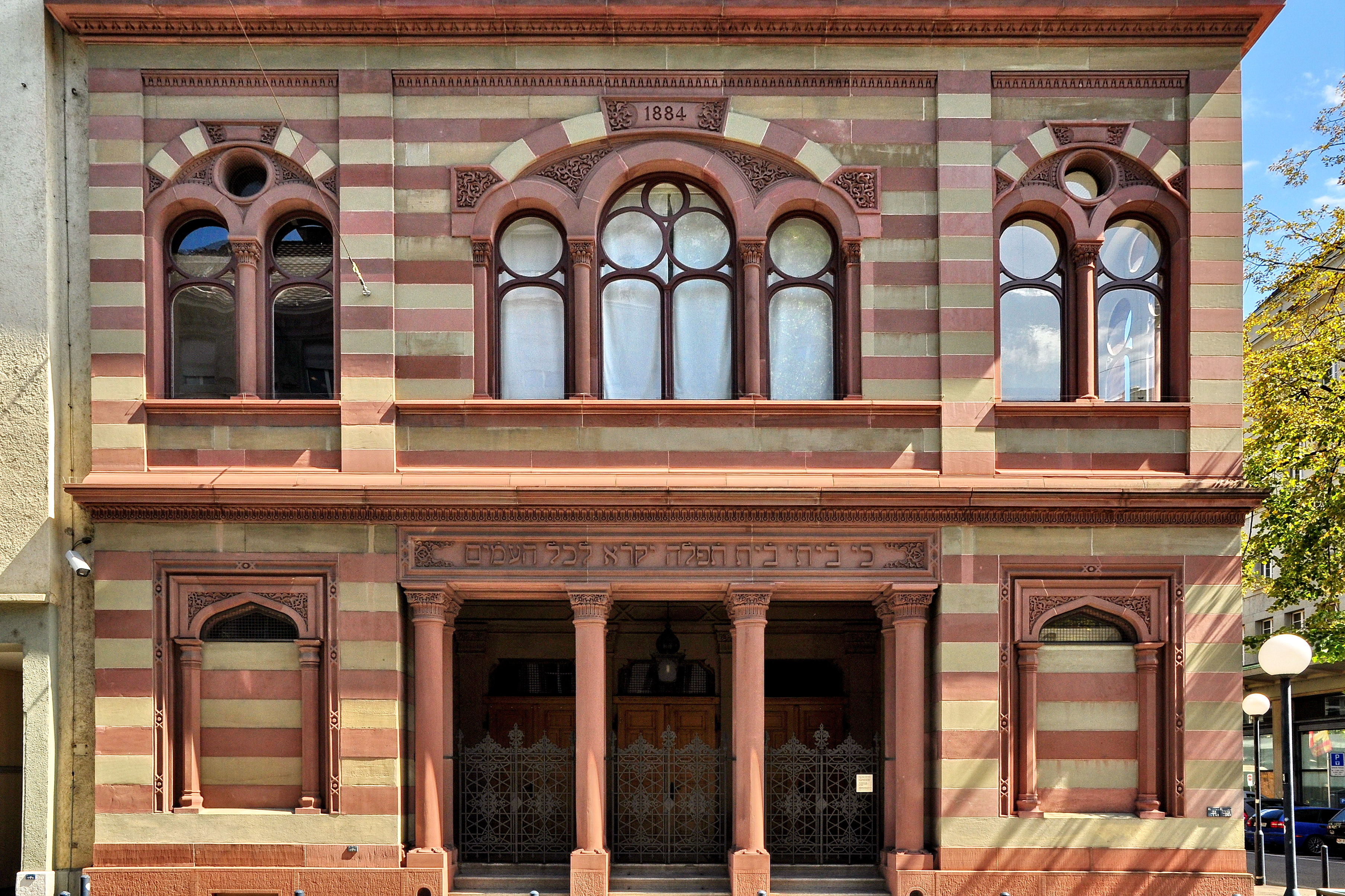 Synagoge der Israelischen Cultusgemeinde, Löwenstrasse in Zürich-City (Switzerland)